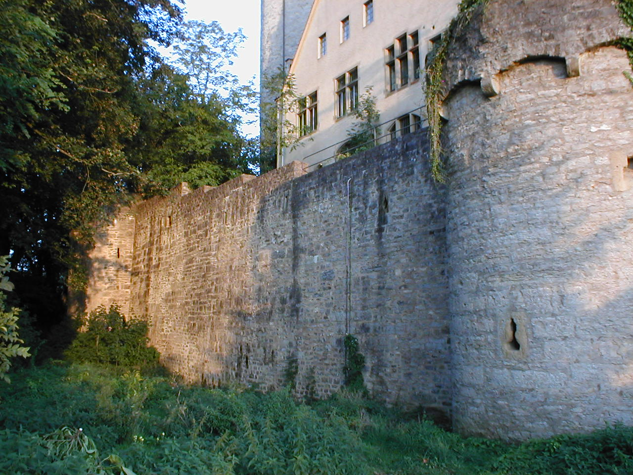 Mauer- und Wehrturm-Anlagen, Burg Möckmühl